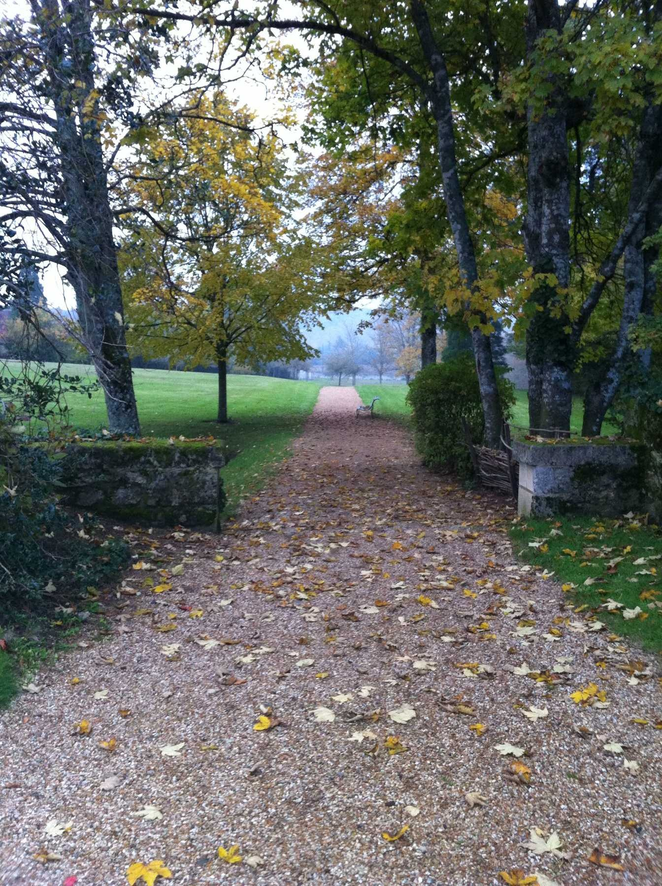 Une allée dans le parc du château de Saché, en Touraine.